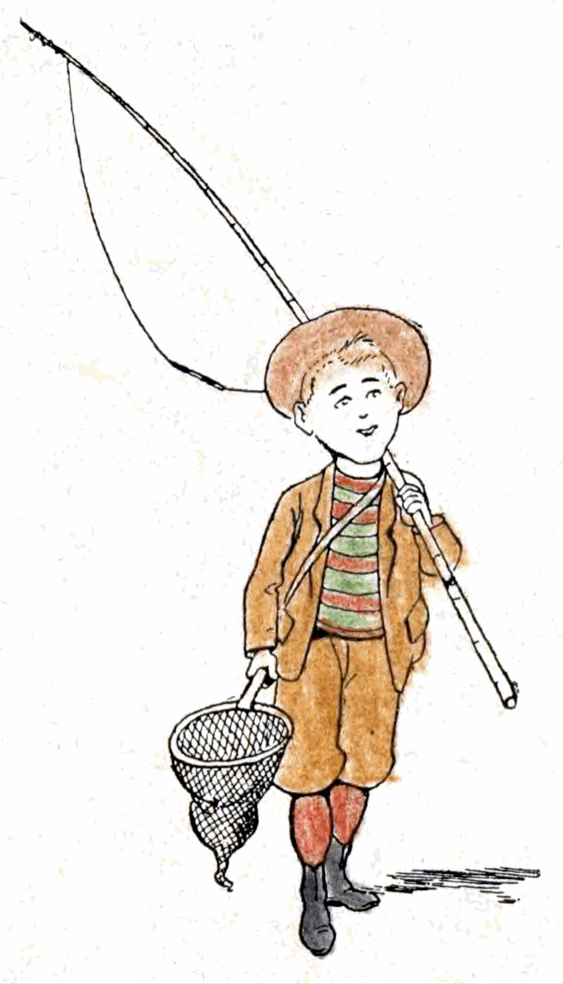 Les Anguilles-1